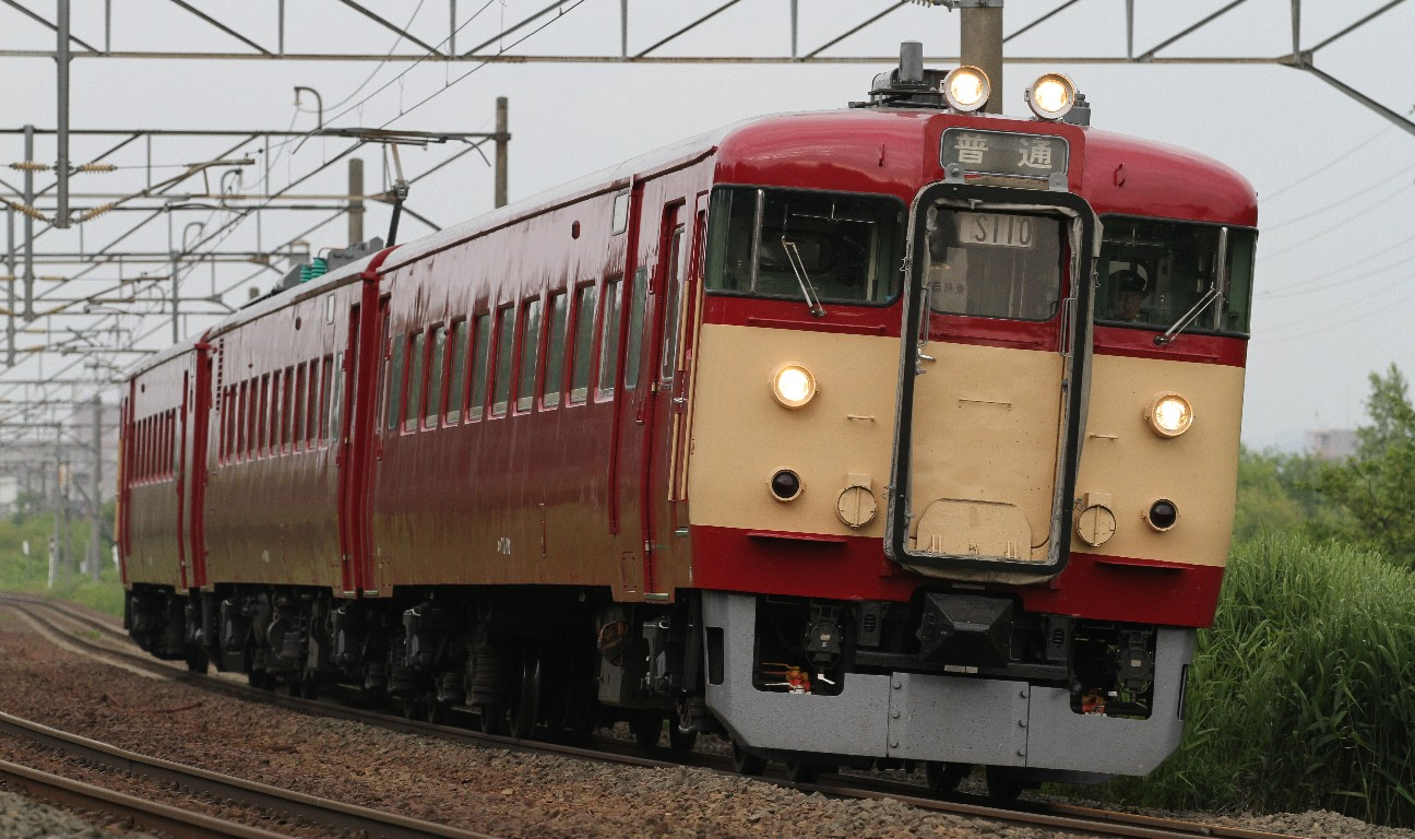 JR北海道711系電車S-110編成による普通列車